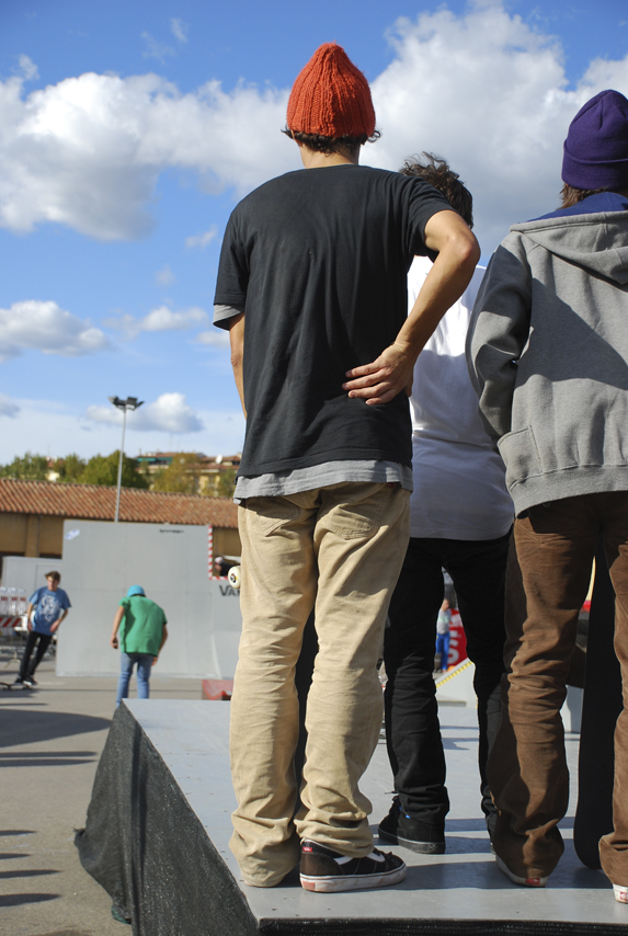 Skateboarder, Festival della Creatività 2009, Florence, Italy.